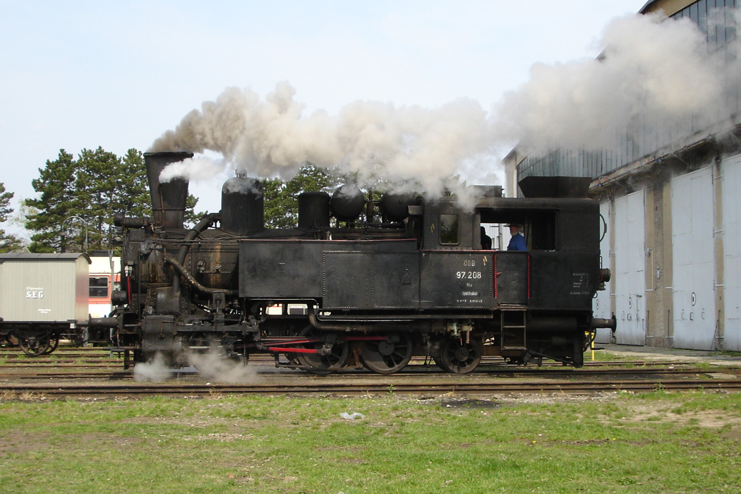 Heizhaus Strasshof, br 97